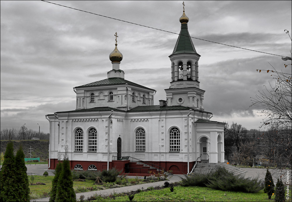 Полацкія замалёўкі